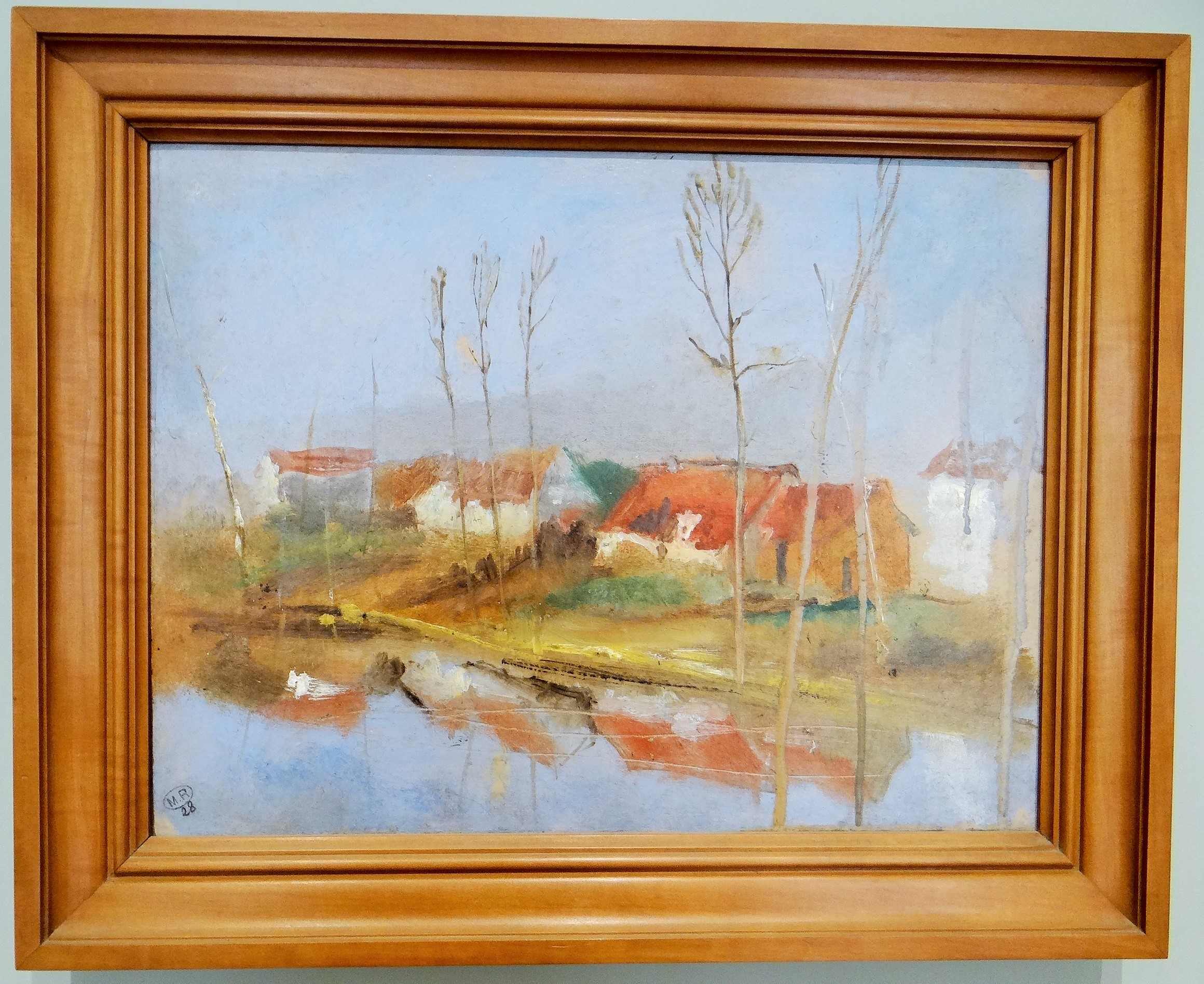 Auguste Rodin, Maisons rouges, huile sur toile, Paris, musée Rodin.